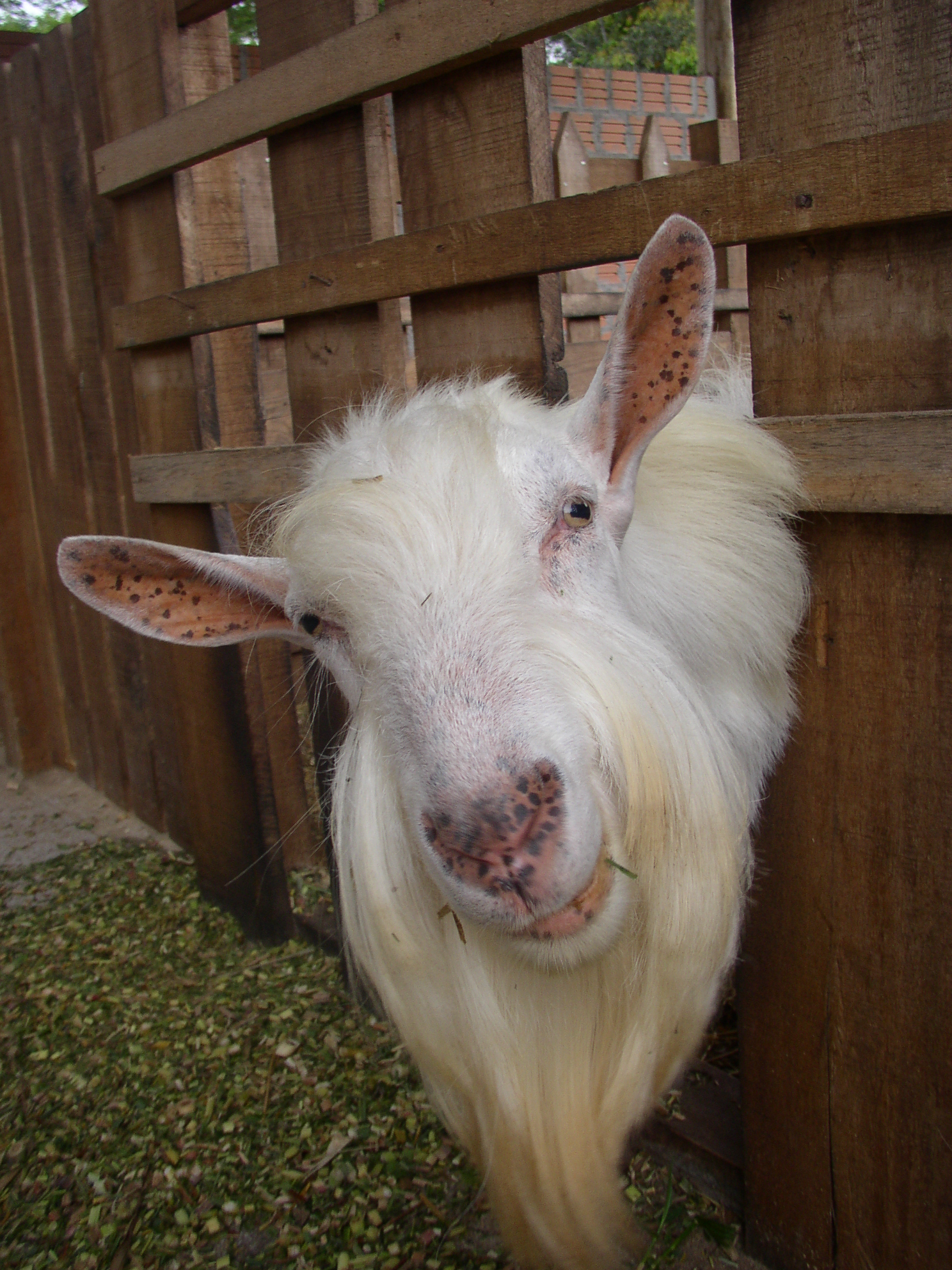 Ziege mit Zuckerrohrhäcksel. Aufnahme in Tijucas, SC, Brasilien